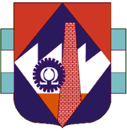 logo de un escuela experimental de la UNT